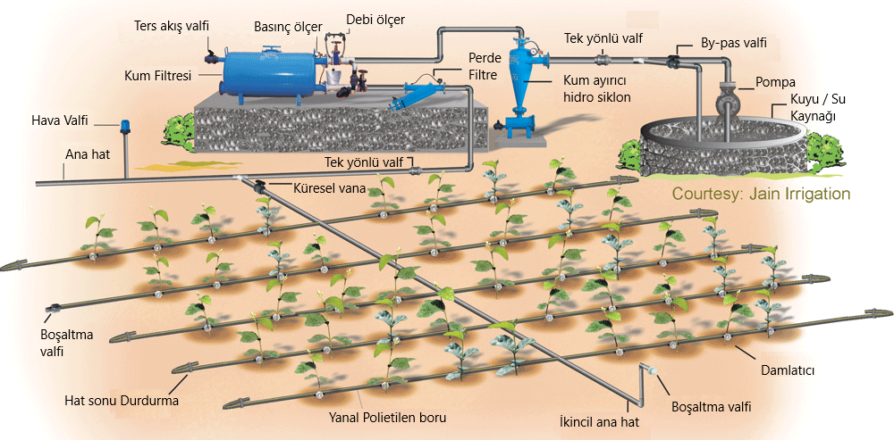 Örnek bir damlatma sulama kurulumunun yapısını gösteren şema.